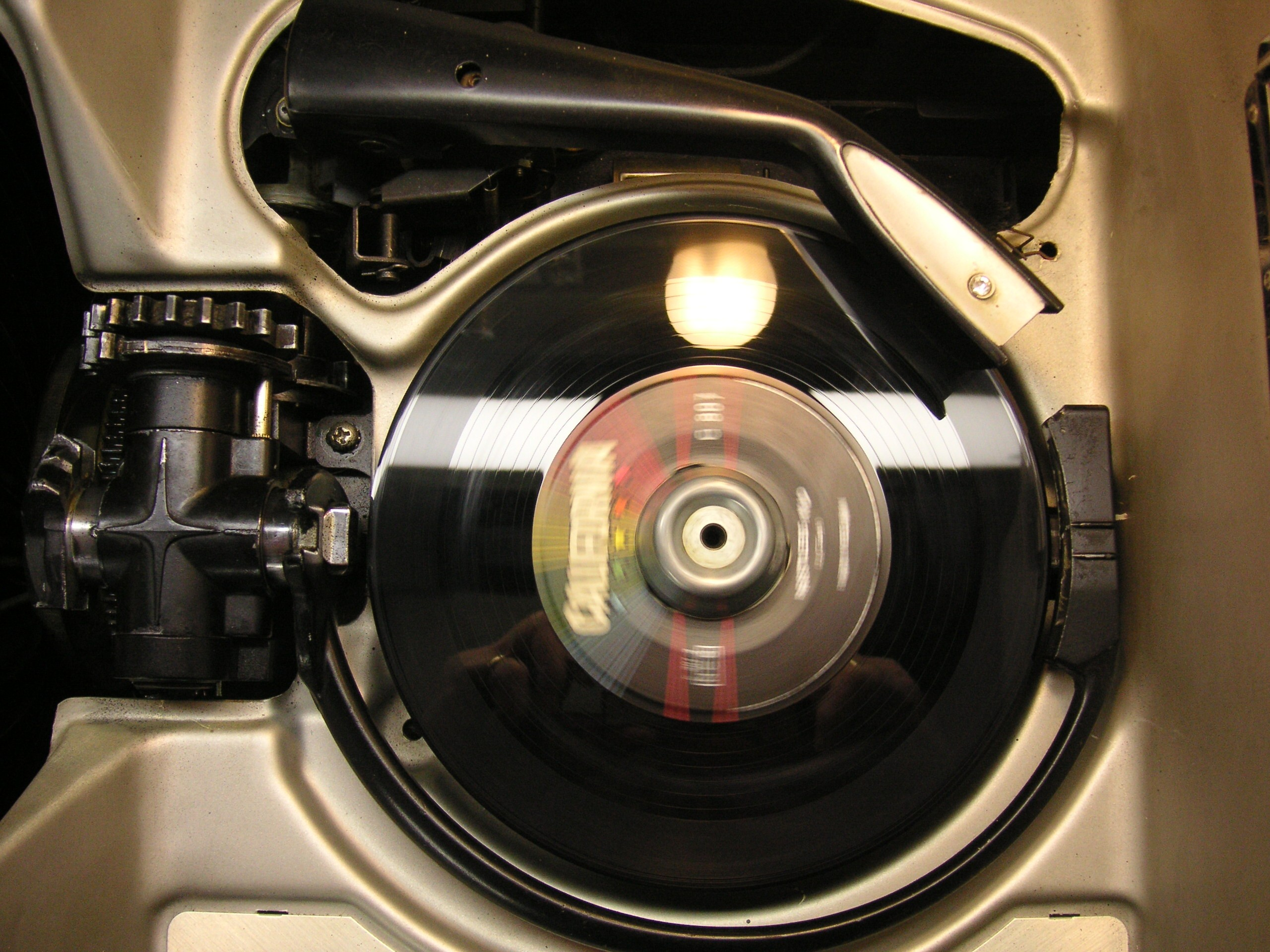 Rock-Ola djukebox Capri II från 1965, skiva på